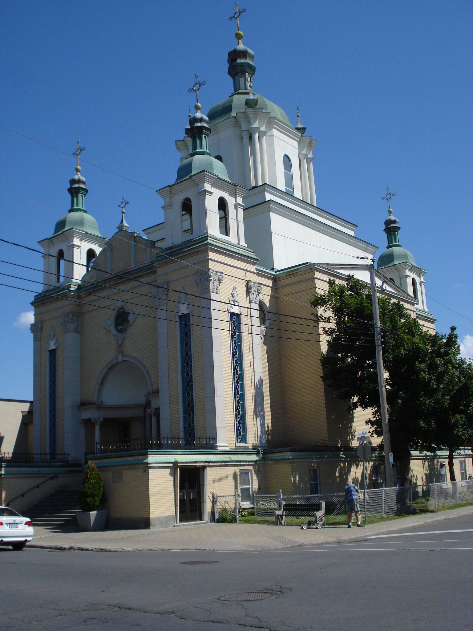 Eglise gréco-catholique ukrainienne Saint Basil le Grand à Lachine